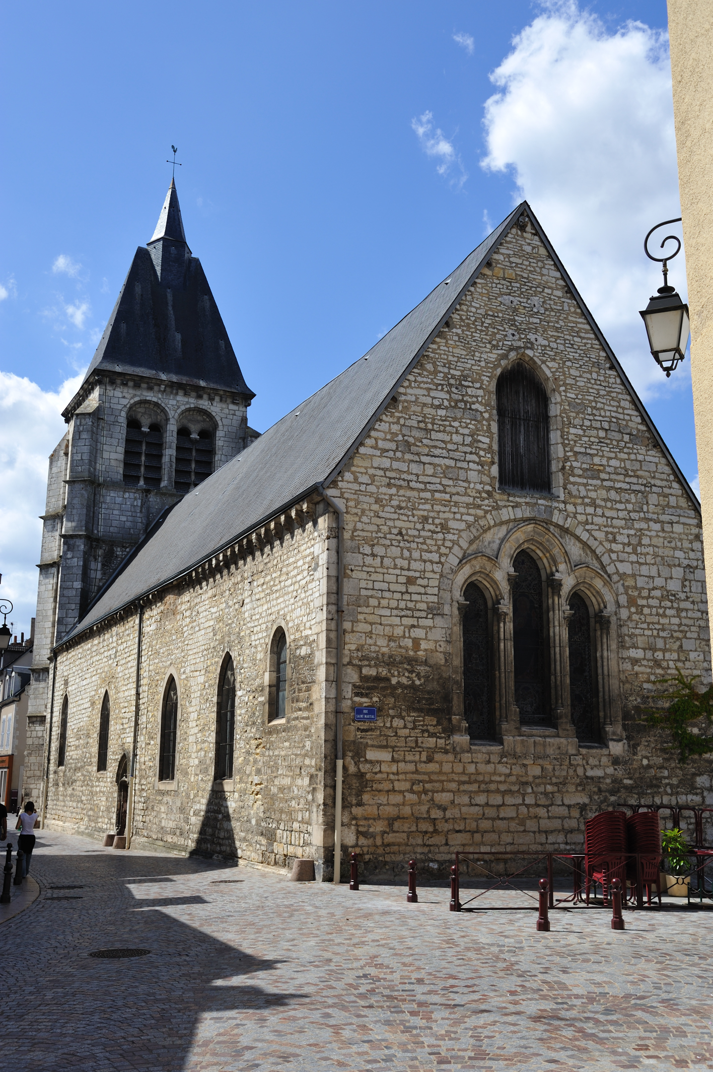 Église Saint-Martial, Châteauroux, Indre, France